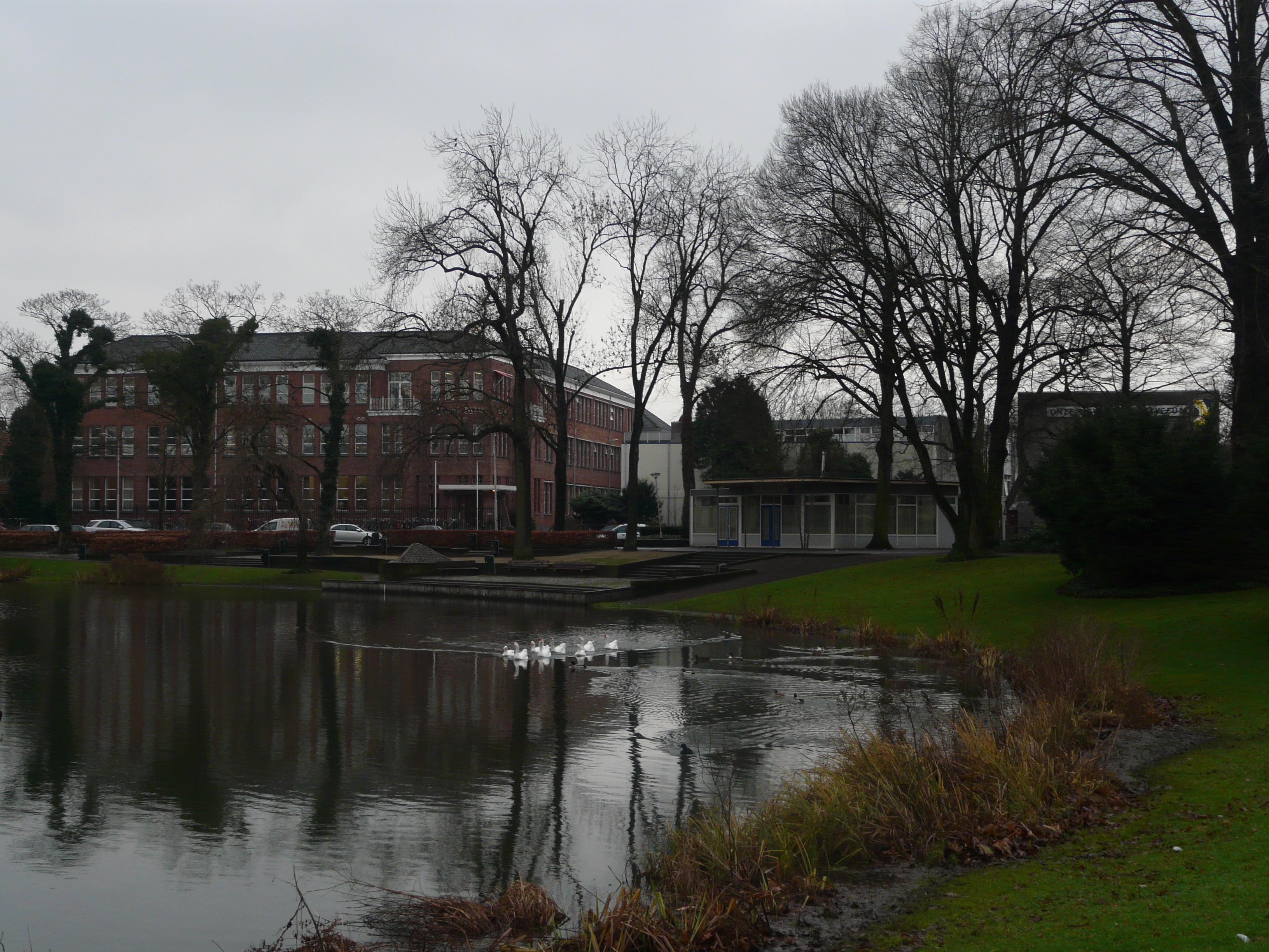 Zicht op een deel van het Onze Lieve Vrouwelyceum in Breda